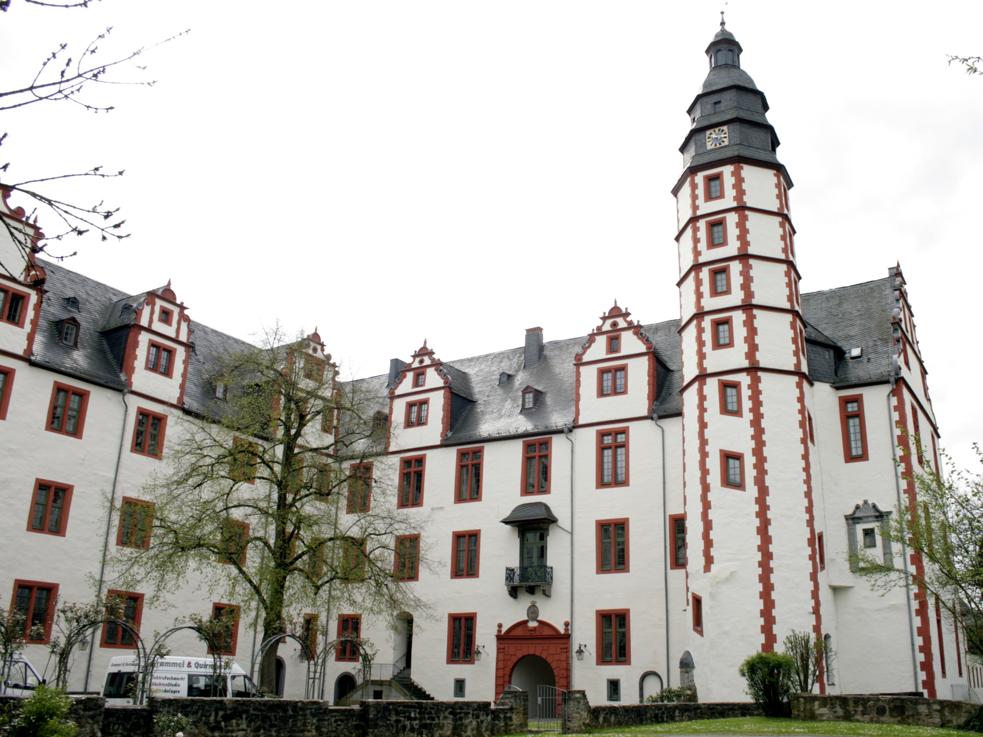 Schloss Hadamar, Südflügel von innen gesehen, Deutschland